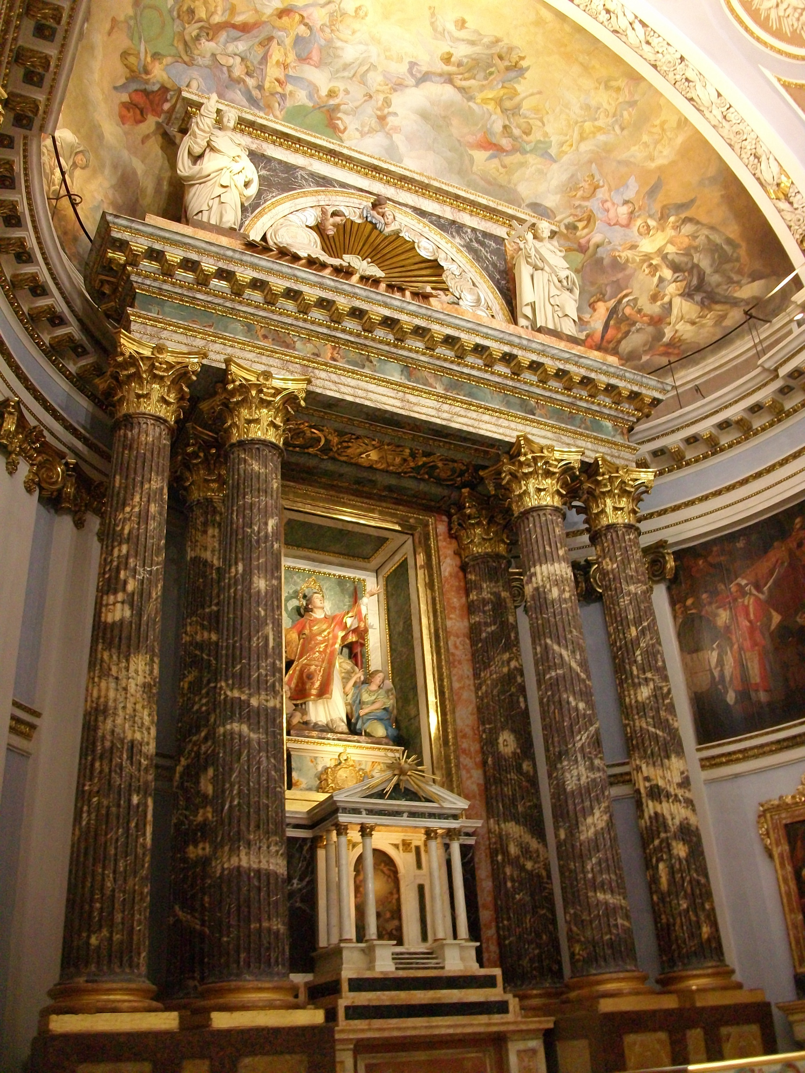 Altar neoclàssic de l'església de Sant Esteve de València, l'Horta, País Valencià.